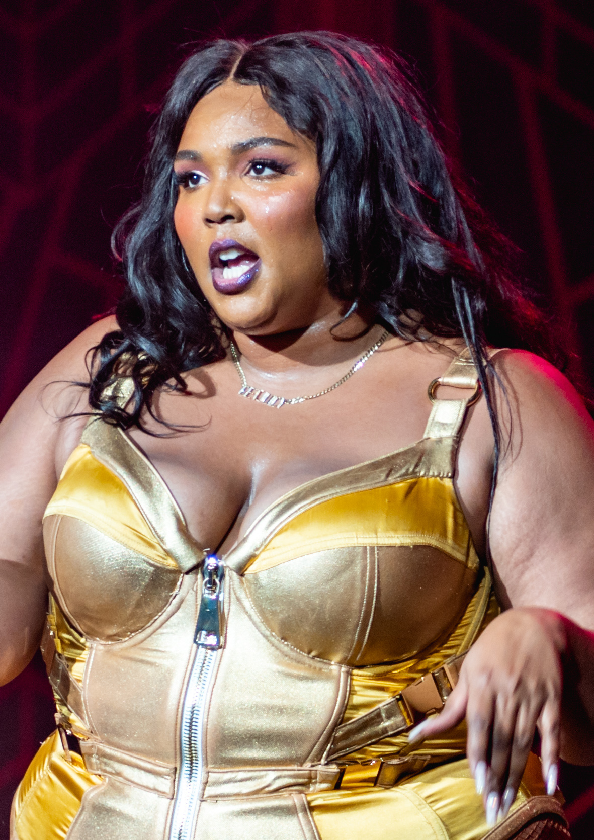 LizzoBrixt06Nov19-20